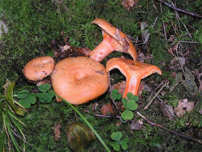 Lactarius salmonicolor - Russulaceae